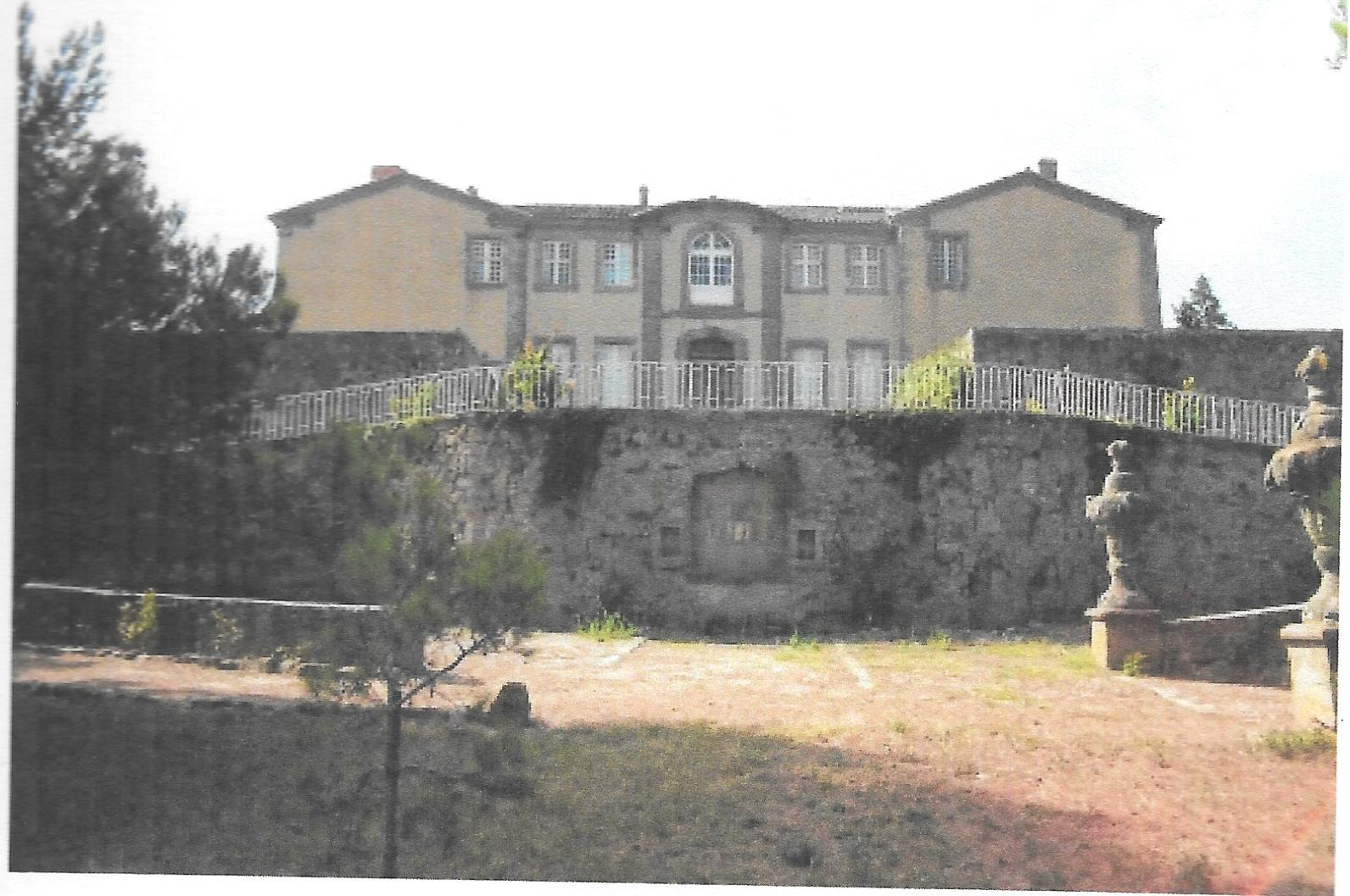 Vue terrasse